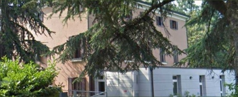 Si tratta della struttura residenziale protetta per pazienti con patologie neuropsichiatriche La Ginestra, facente parte dapprima della Cooperativa sociale Ambra, poi Pineta. È stata inaugurata nei locali dell'ex hotel ristorante Sporting di via Campioli nel 1997